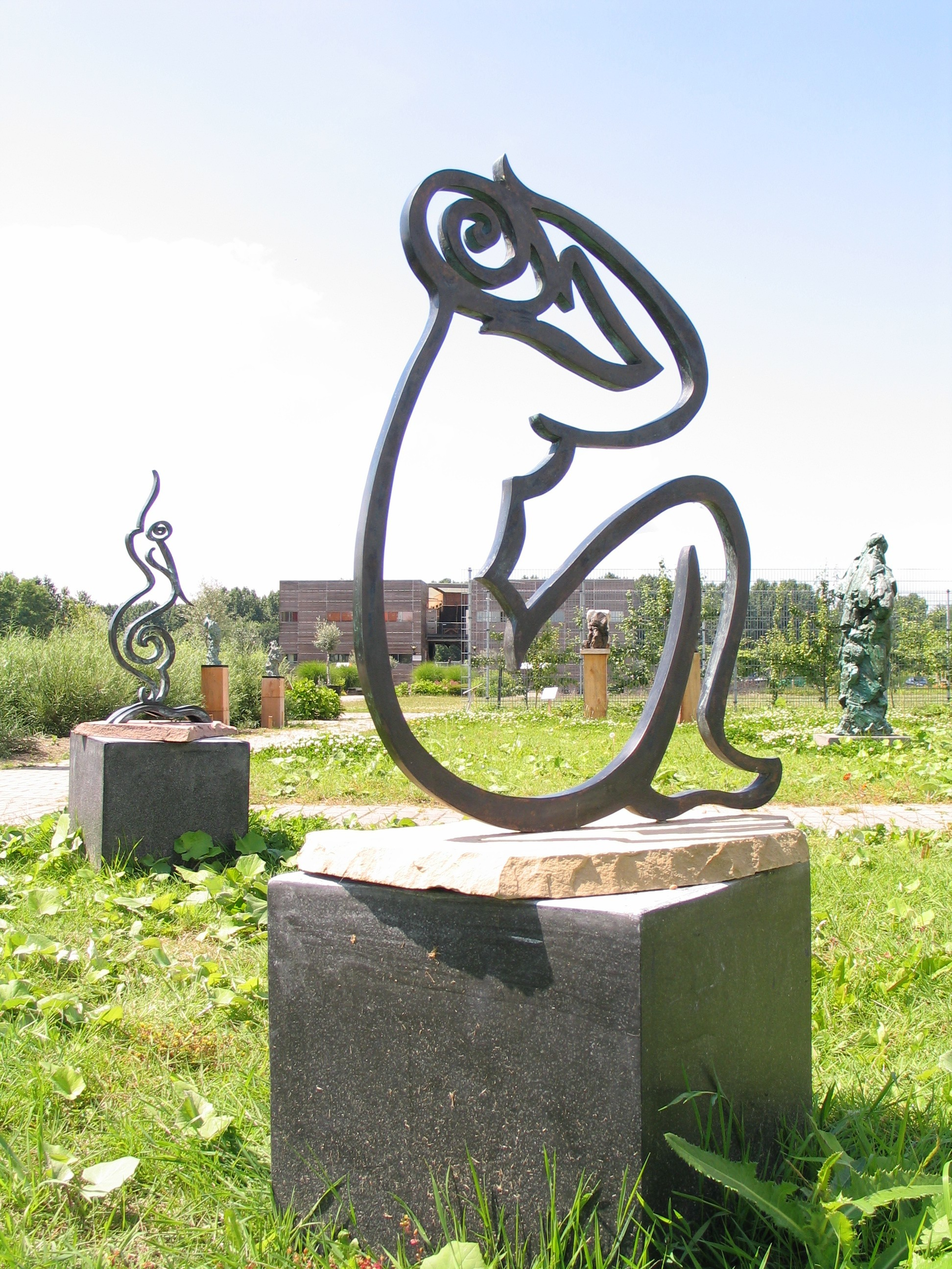 Sculptuur (brons) van Donna Corbani, Stadslandgoed De Kemphaan, Almere, 2005